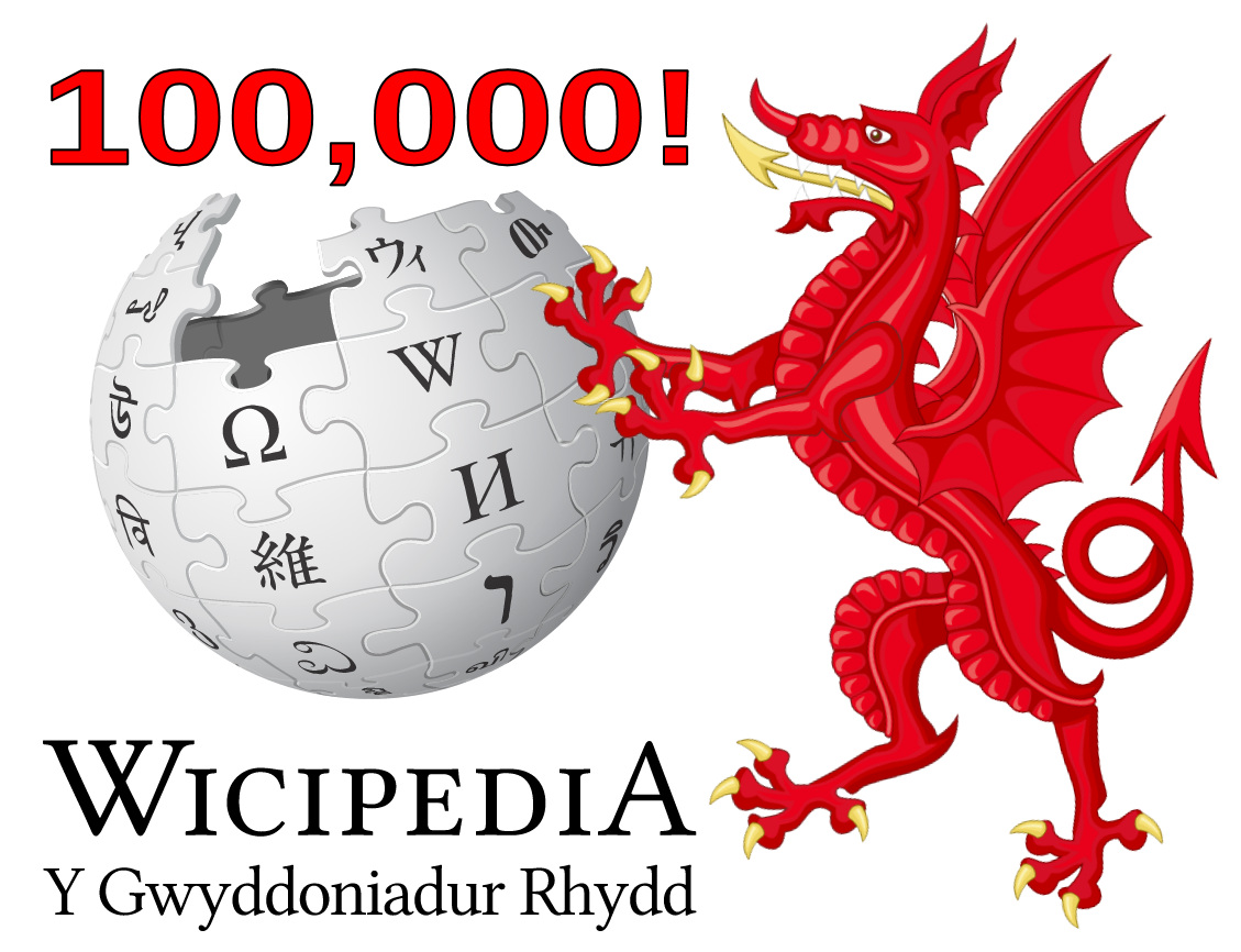 Baner i ddathlu cyrraedd y 100,000fed erthygl heddiw 27 Mawrth 2018.